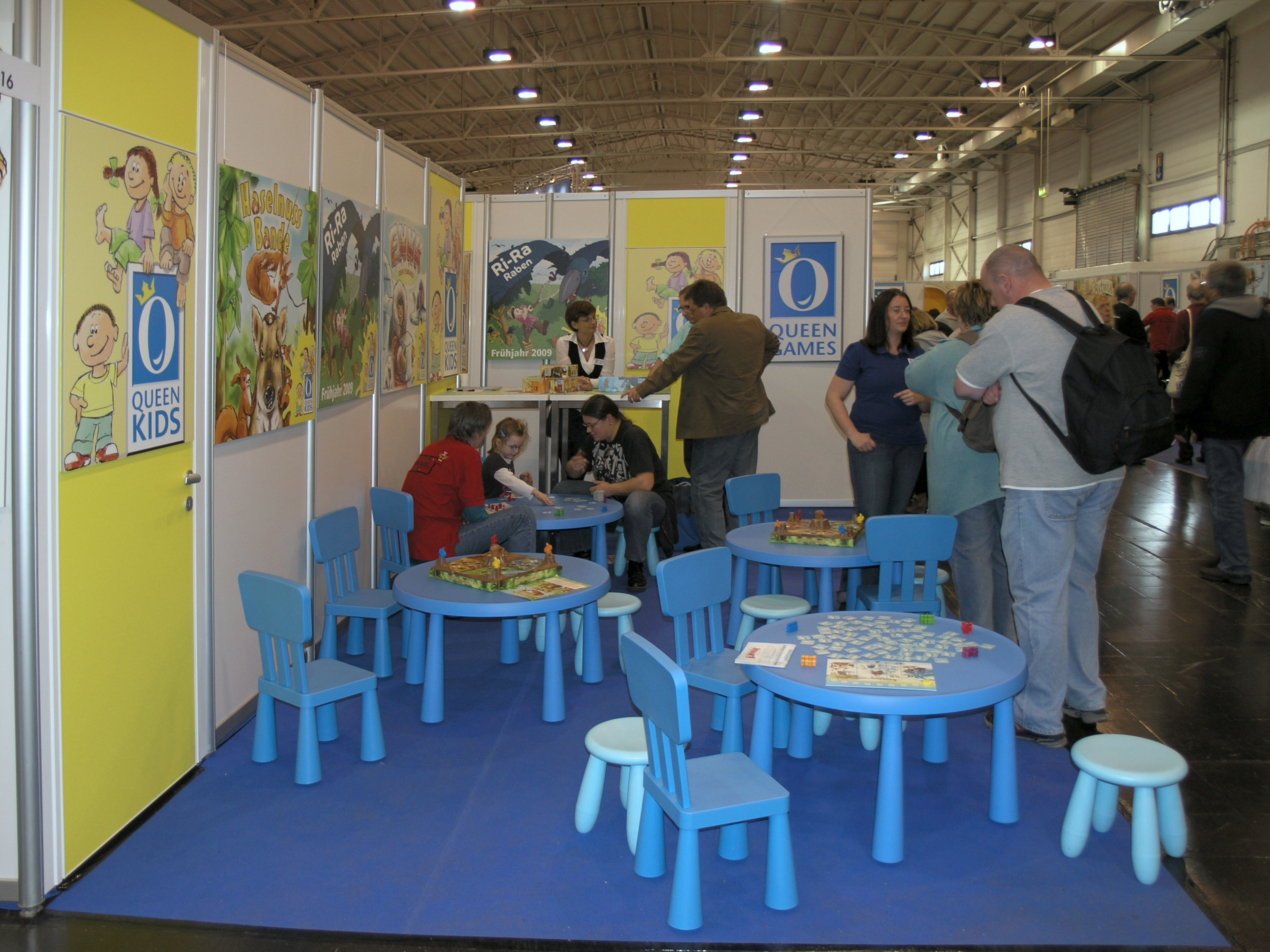 Internationalen Spieltage SPIEL 2008